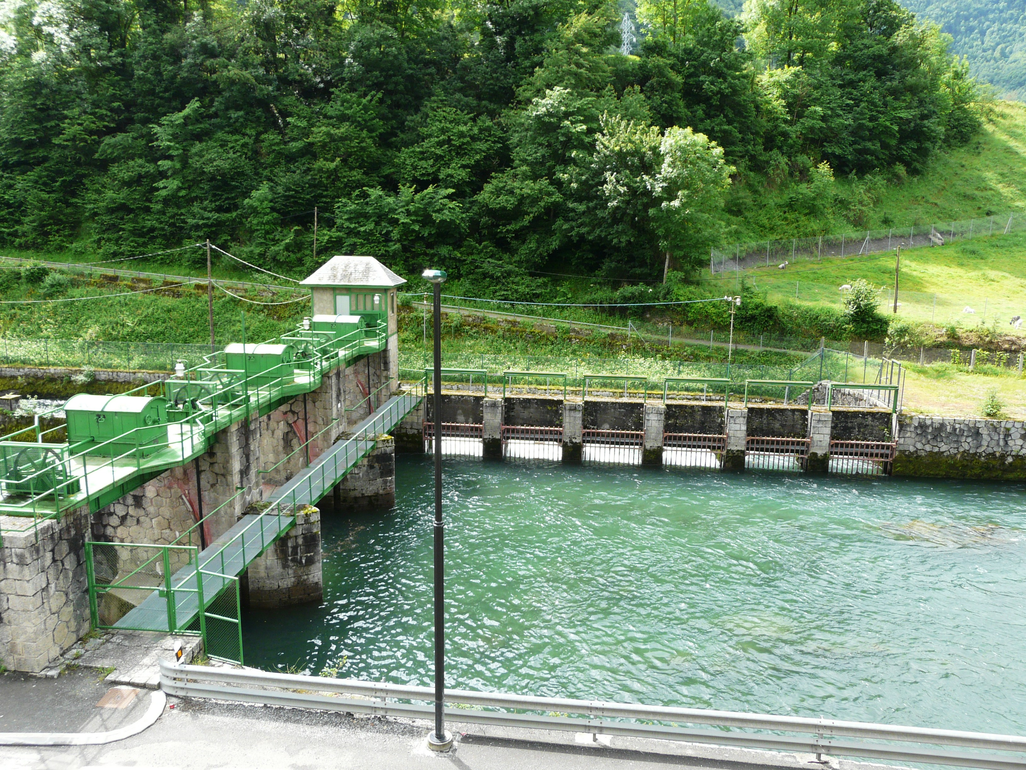 Le barrage de Bossòst sur la Garonne, Val d'Aran, Catalogne, Espagne.